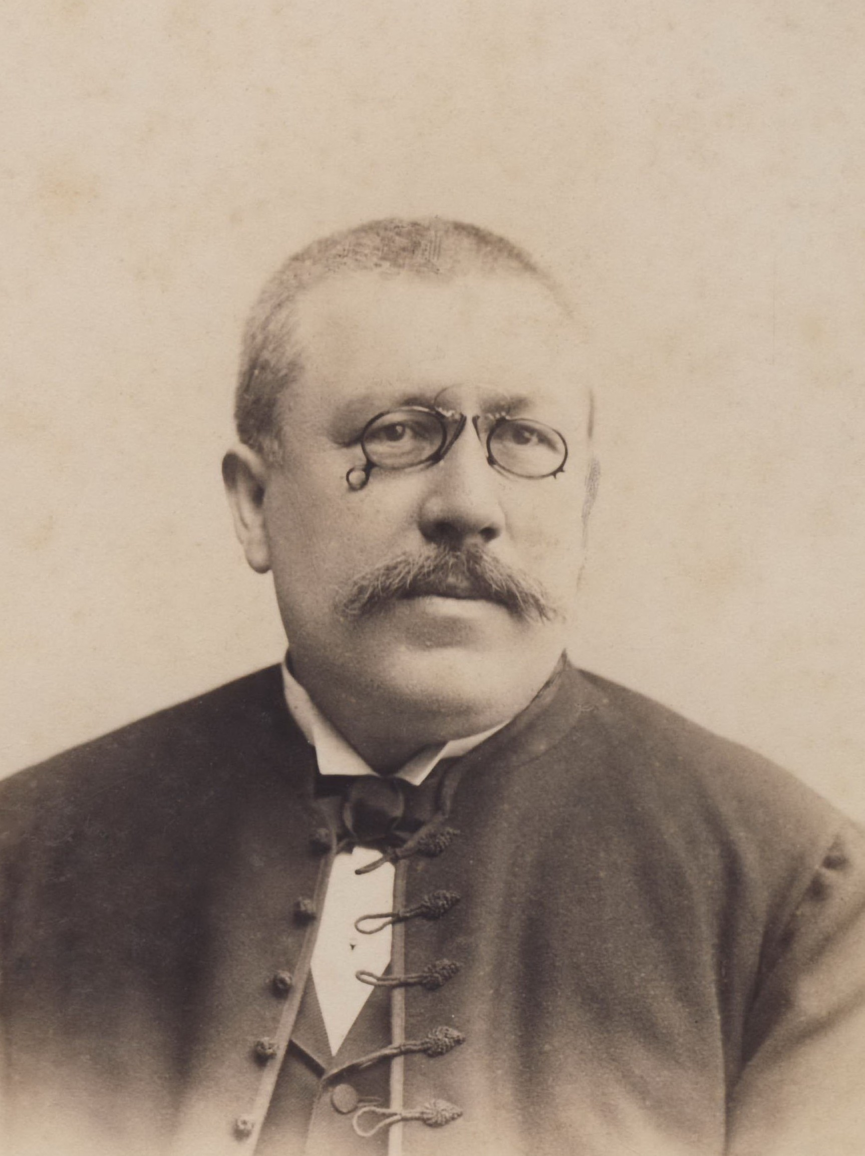 Josef Anýž (29.2.1852 Hořovice - 27.6.1912 Praha, český politik, novinář a pedagog